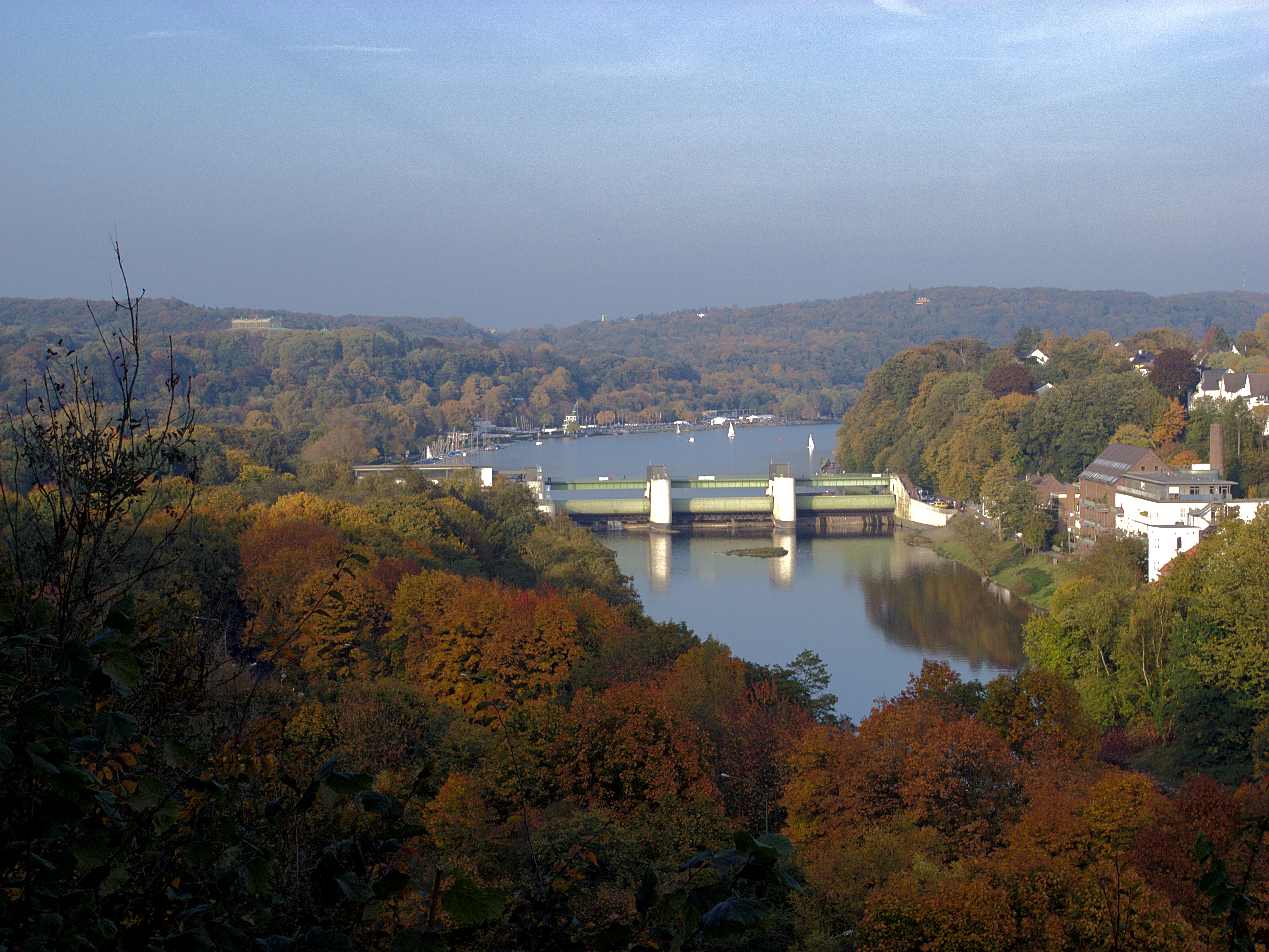 Baldeneysee von Essen-Werden aus gesehen